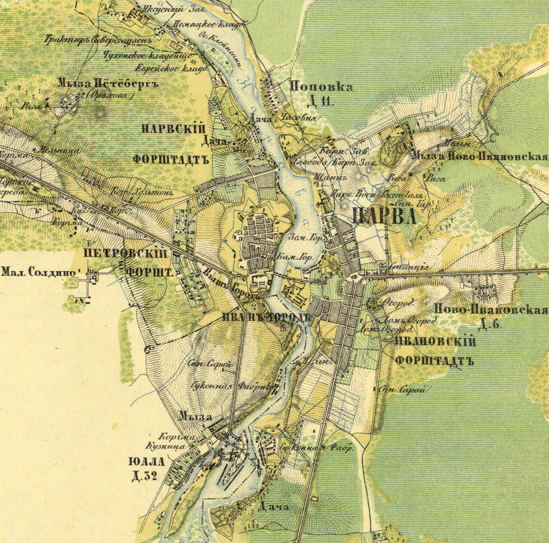 Ивангород карте 1860 года.